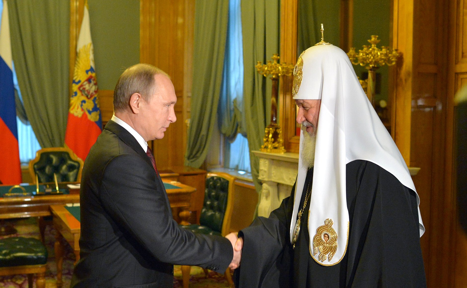 Встреча Президента России Владимира Путина с Патриархом Московским и всея Руси Кириллом. Глава государства поздравил предстоятеля Русской православной церкви с Днём рождения.